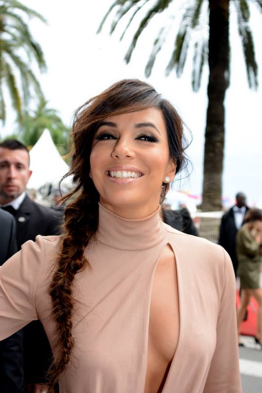 Eva Longoria au festival de Cannes